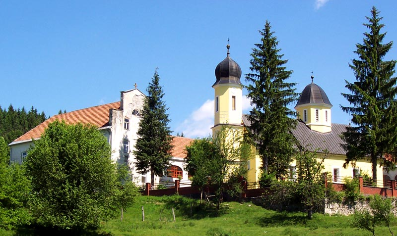 Manastir Gomirje s crkvom sv. Jovana Preteče.